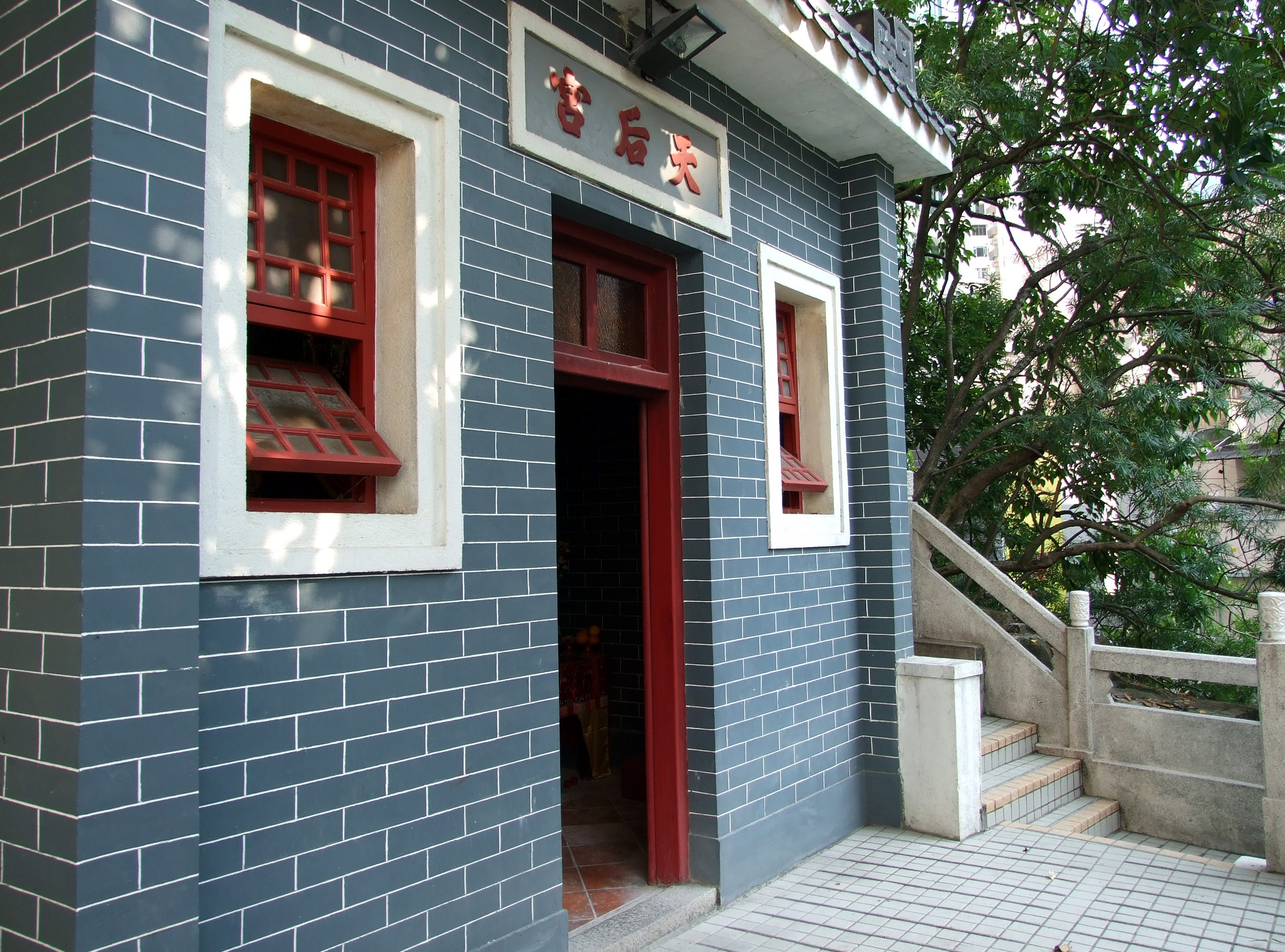 中文（香港）: 黃泥涌譚公天后廟